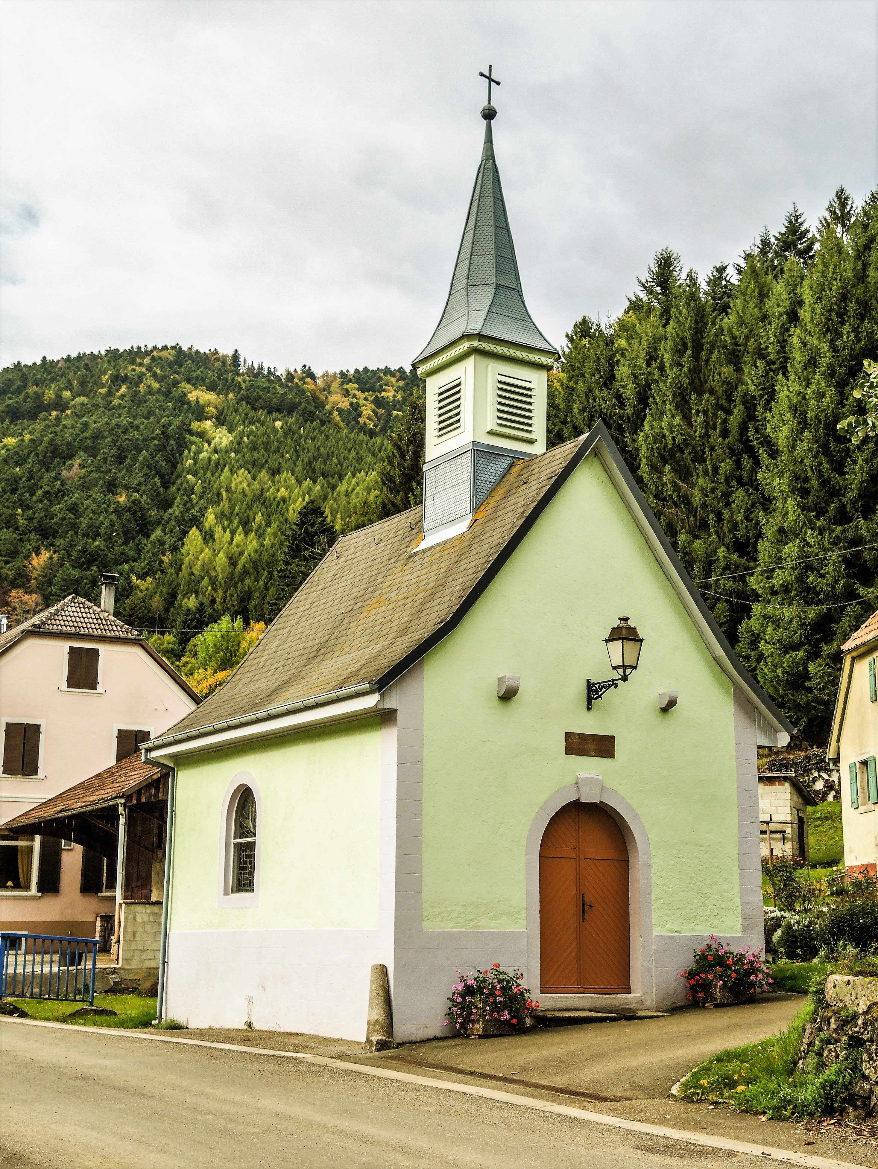 Chapelle Notre-Dame du Perpétuel Secours, à l'entrée du hameau de Ermensbach. Rimbach-près-Masevaux. Haut-Rhin.